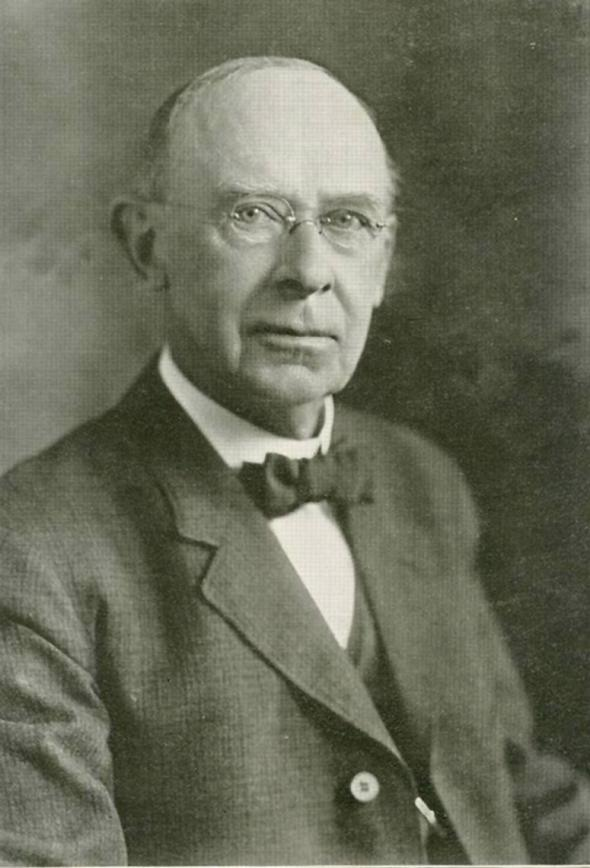 Samuel Leeds Allen (1841 – 1918)